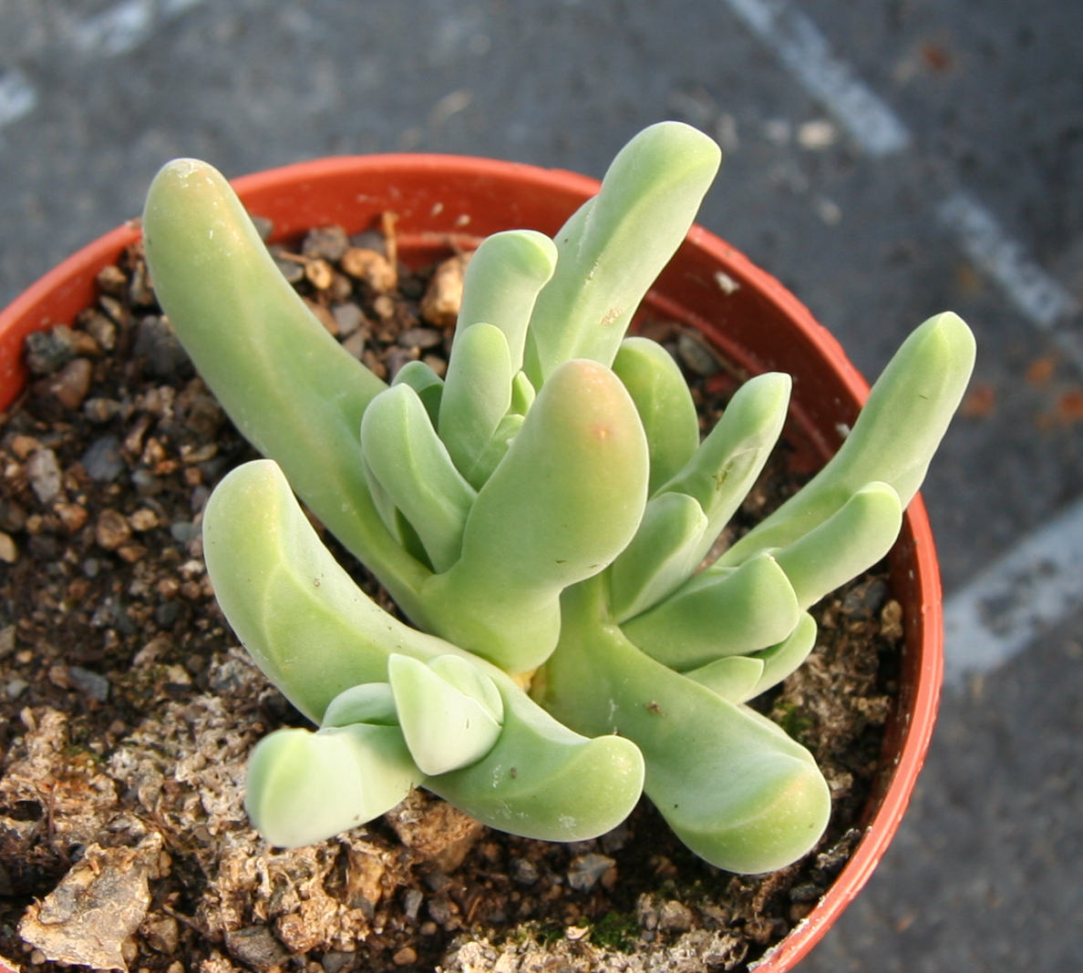 Gibbaeum geminum SB647 in Kultur bei Kakteen-Haage in Erfurt